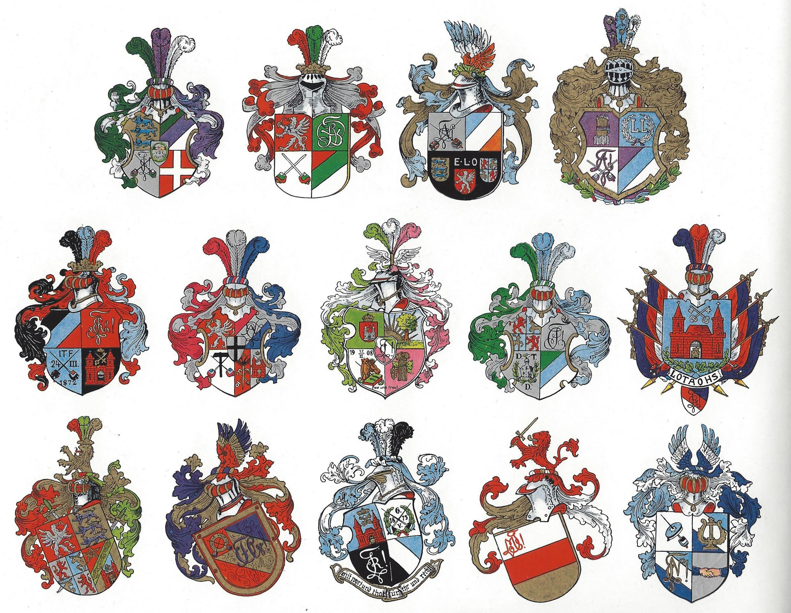 Studentenwappen der deutschen Korporationen in Dorpat, Riga und St. Petersburg.